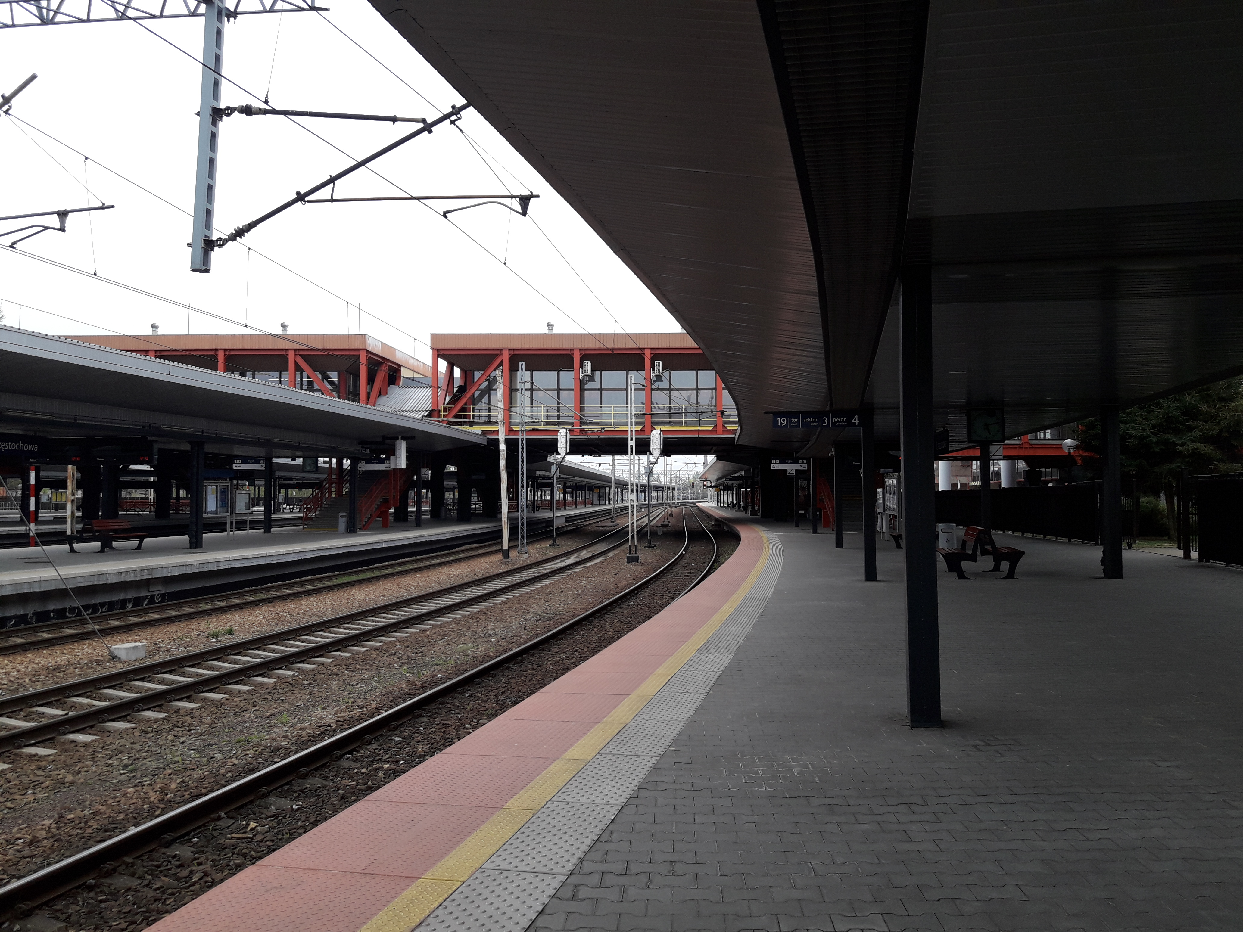 Częstochowa Osobowa, peron 4